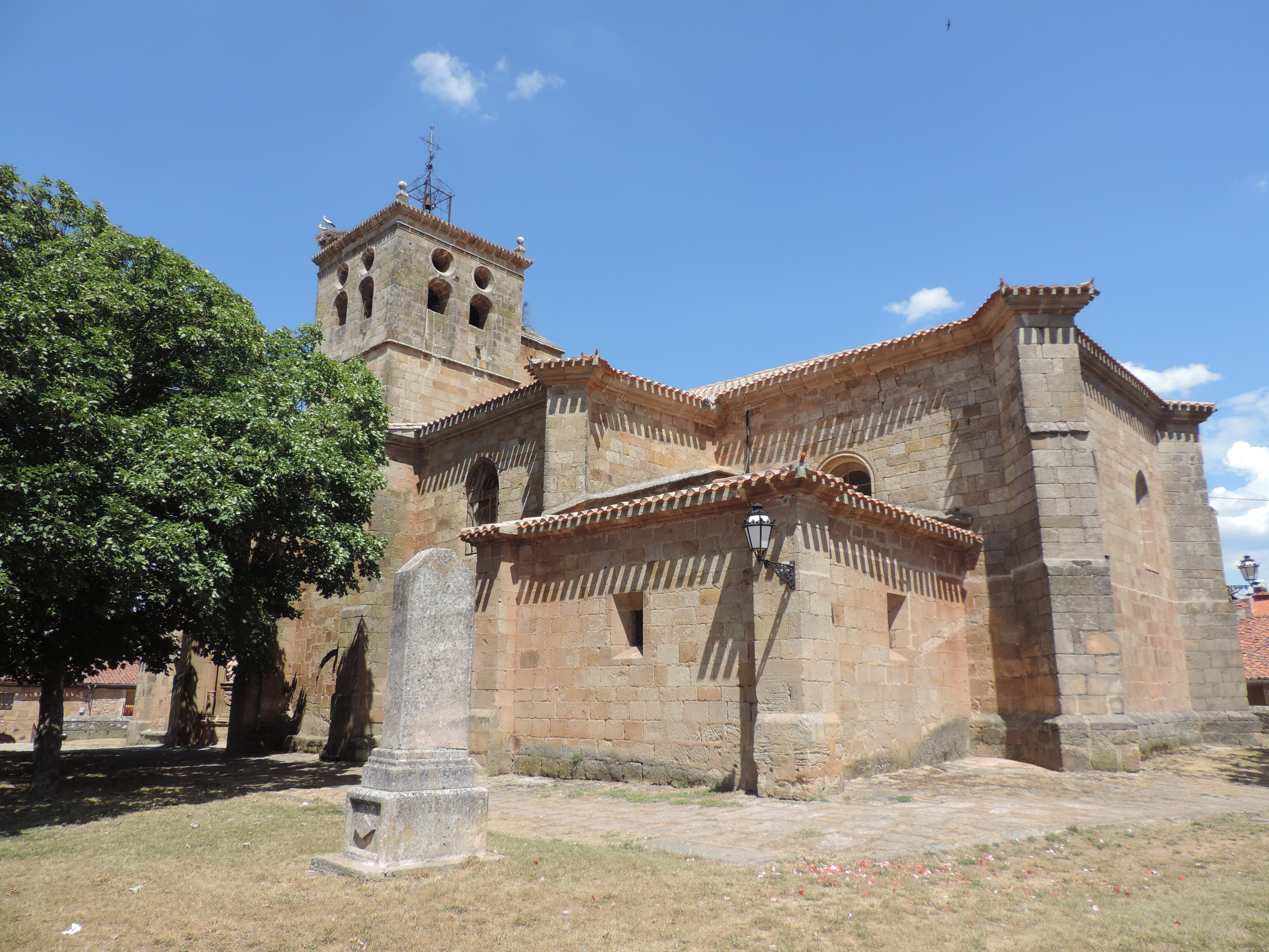 Fotografía de la iglesia parroquial de Santa Maria de Salas de los Infantes